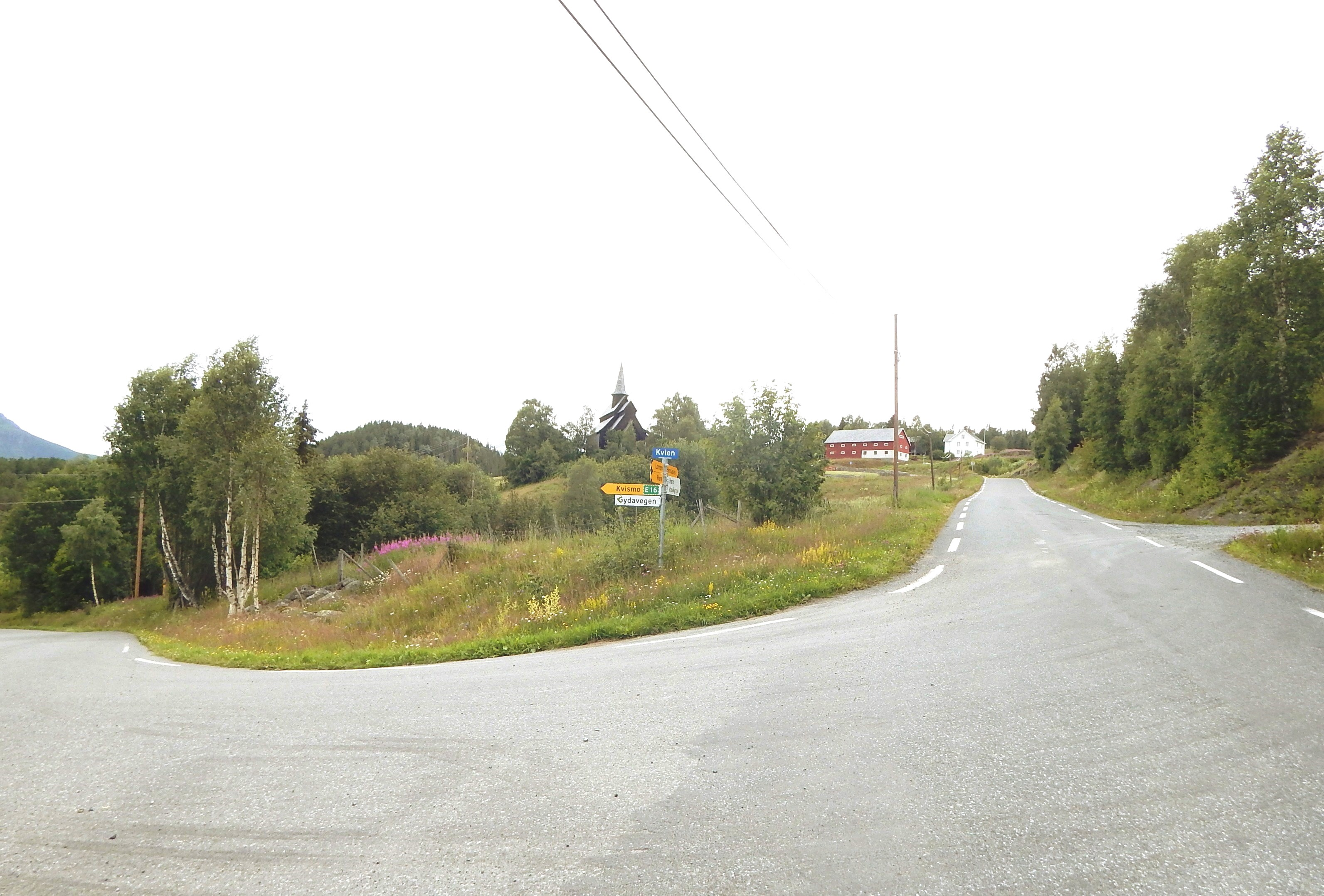 Fylkesvei 2510 (tidl. 293) ved Kvien, sørøst for Høre stavkirke